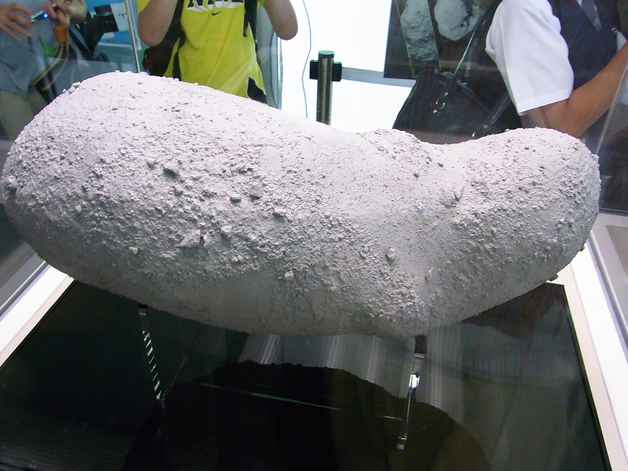 小惑星「イトカワ」